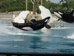 Dieses Bild zeigt Kim 2, den Vater der Kälber im Marineland Antibes und seinen ersten Sohn Valentin. Beide vollführen täglich mit den anderen Walen eine Show.